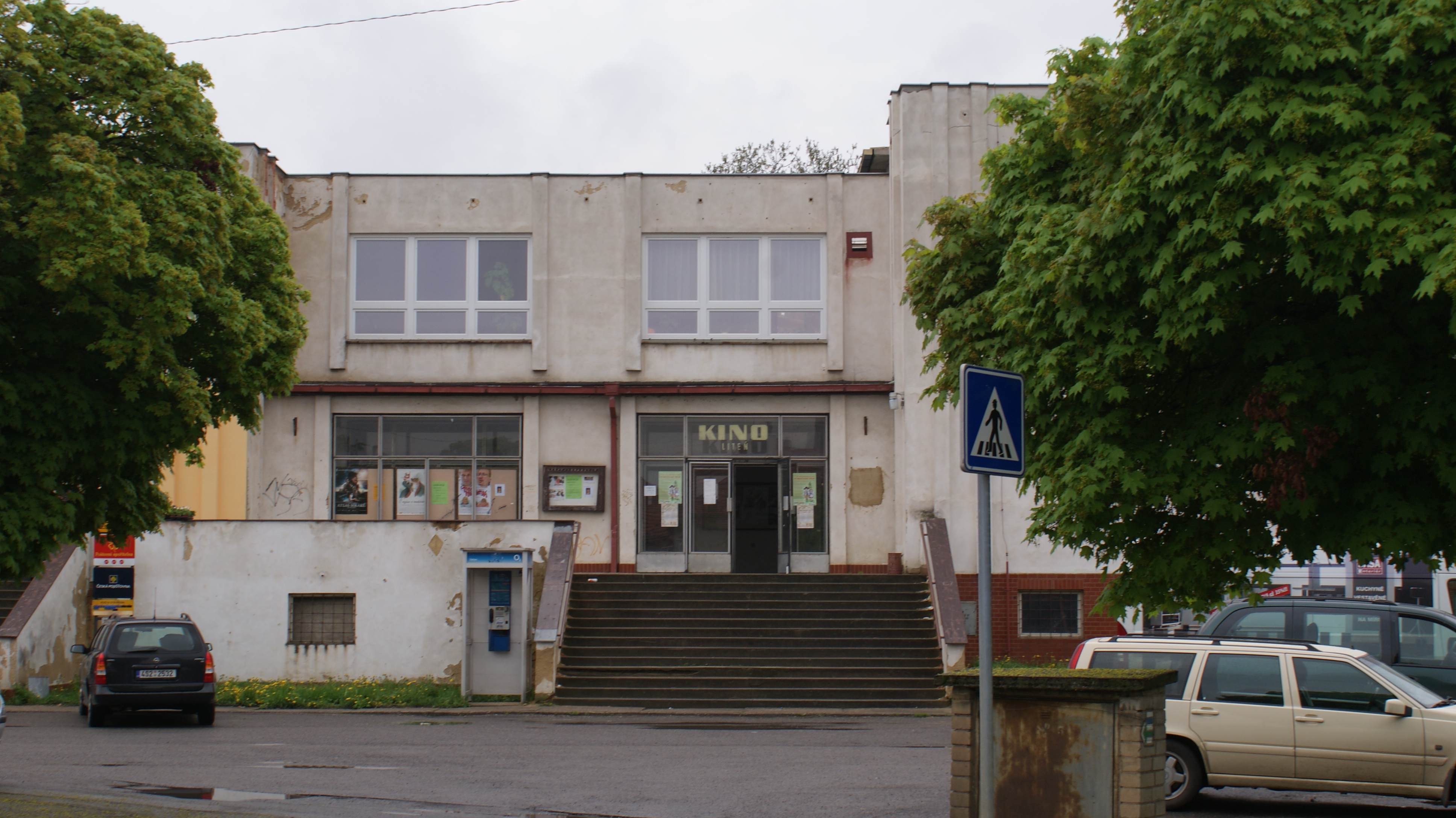 V Litni je stále provozováno kino, sídlí ve stejné budově jako pošta.